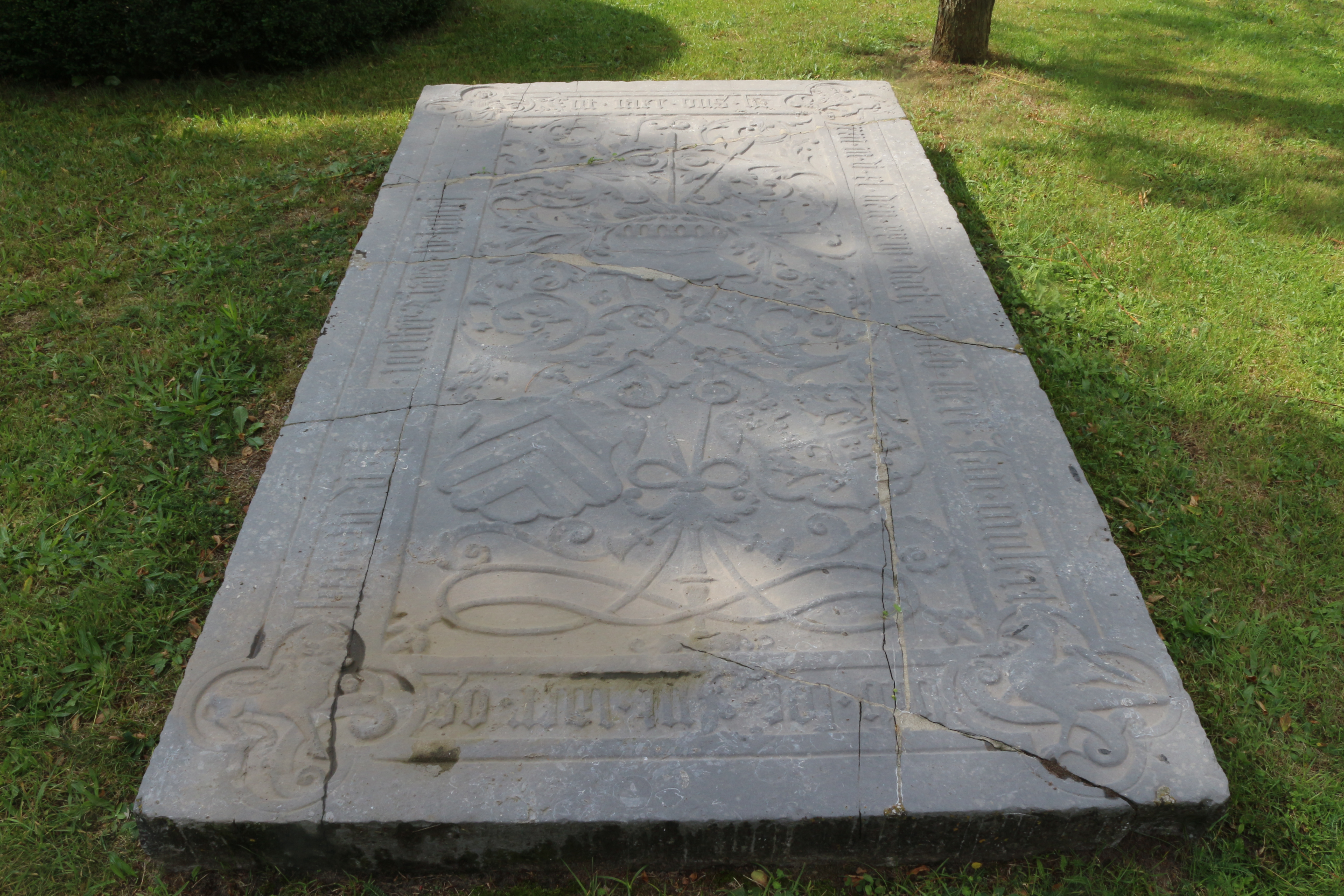 Close-up grafsteen Jan Mulert op begraafplaats Bergklooster te Zwolle